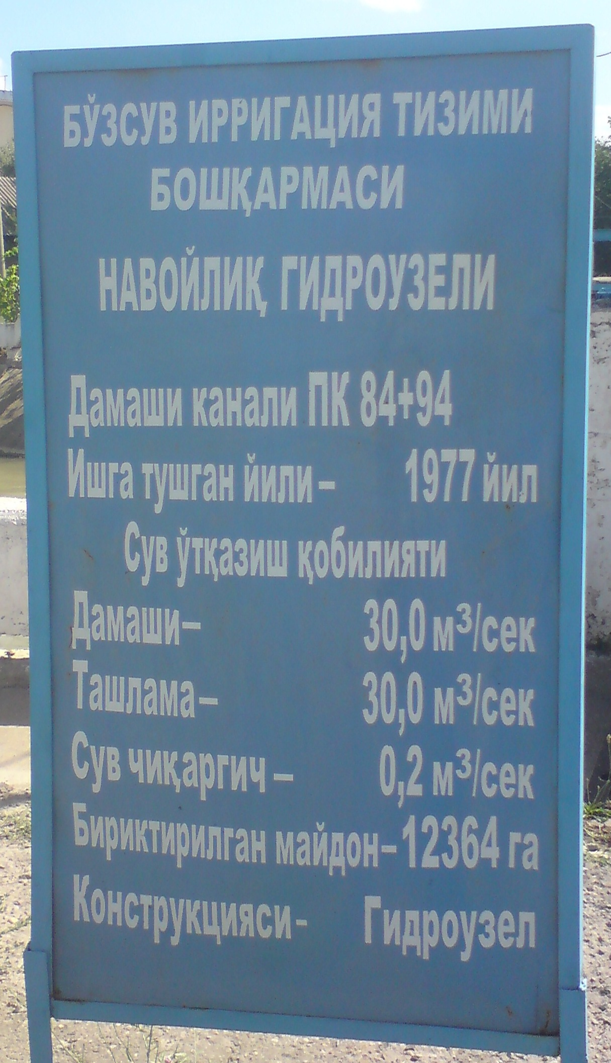 Технические характеристики гидроузла Навойлик на канале Дамарык (Дамаши), город Ташкент